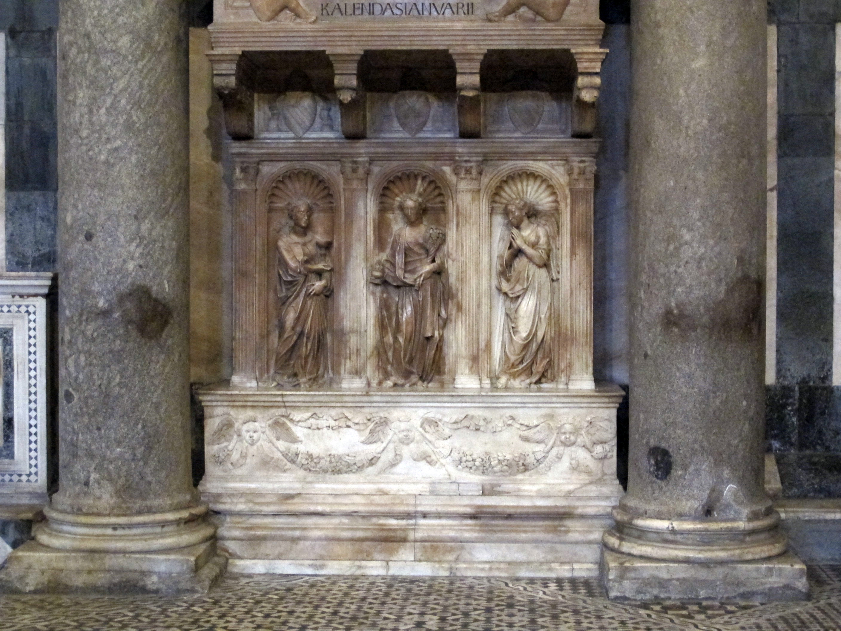 Tomba dell'antipapa giovanni xxiii